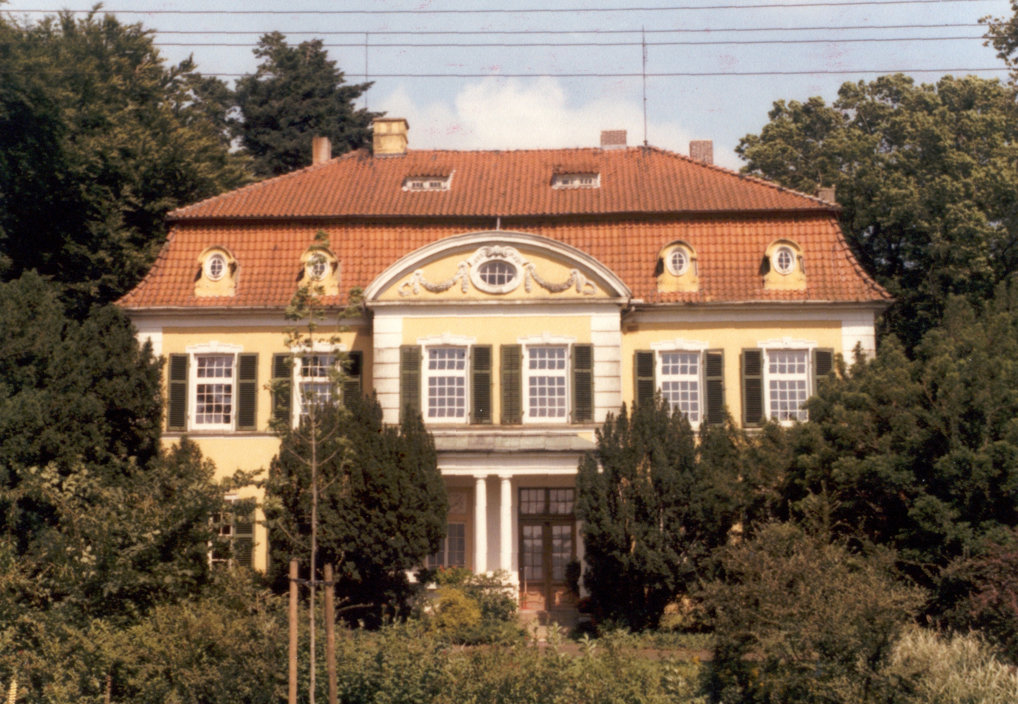 Gutshaus der Familie Vinnen in 27616 Beverstedt-Osterndorf, Landkreis Cuxhaven, Niedersachsen, Deutschland. Wohnung und Atelier des Kunstmalers Carl Vinnen (1863 - 1922). 53°26'30.55"N 8°50'1.01"O